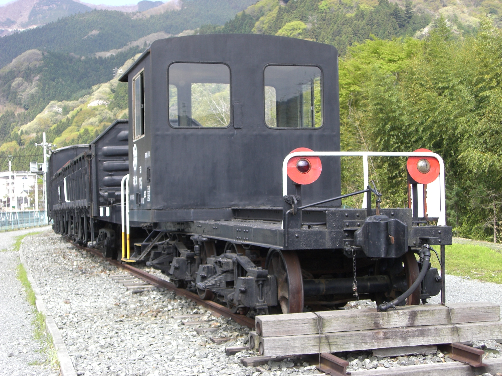 秩父鉄道 ヨ15